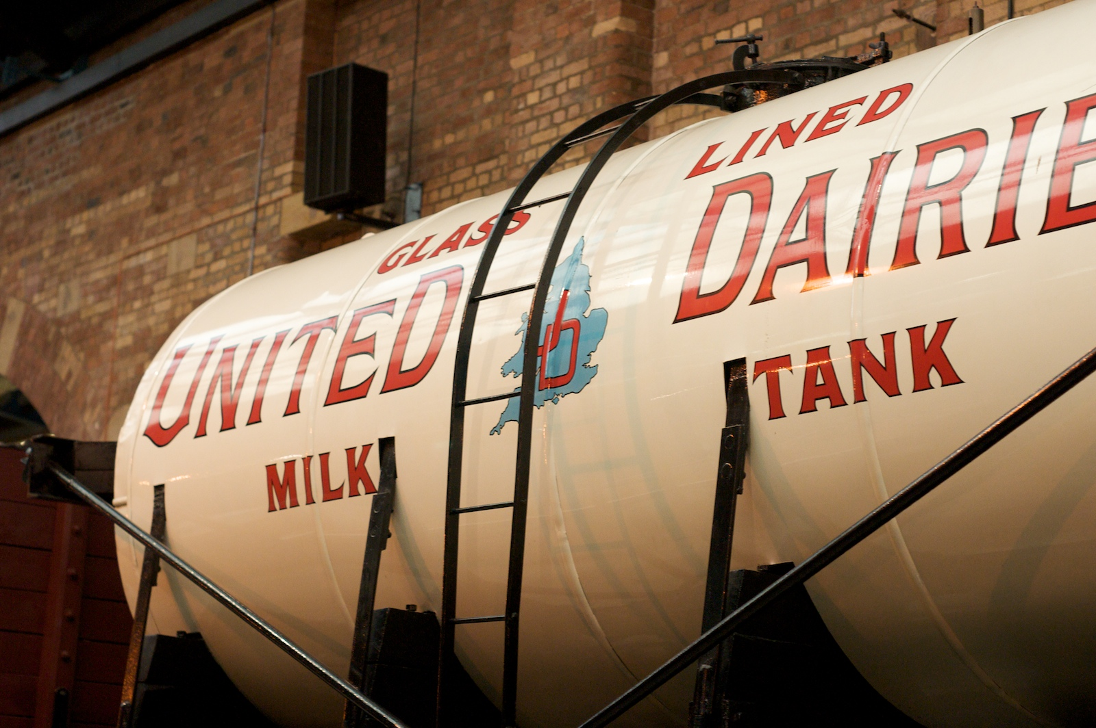 Milk Tank